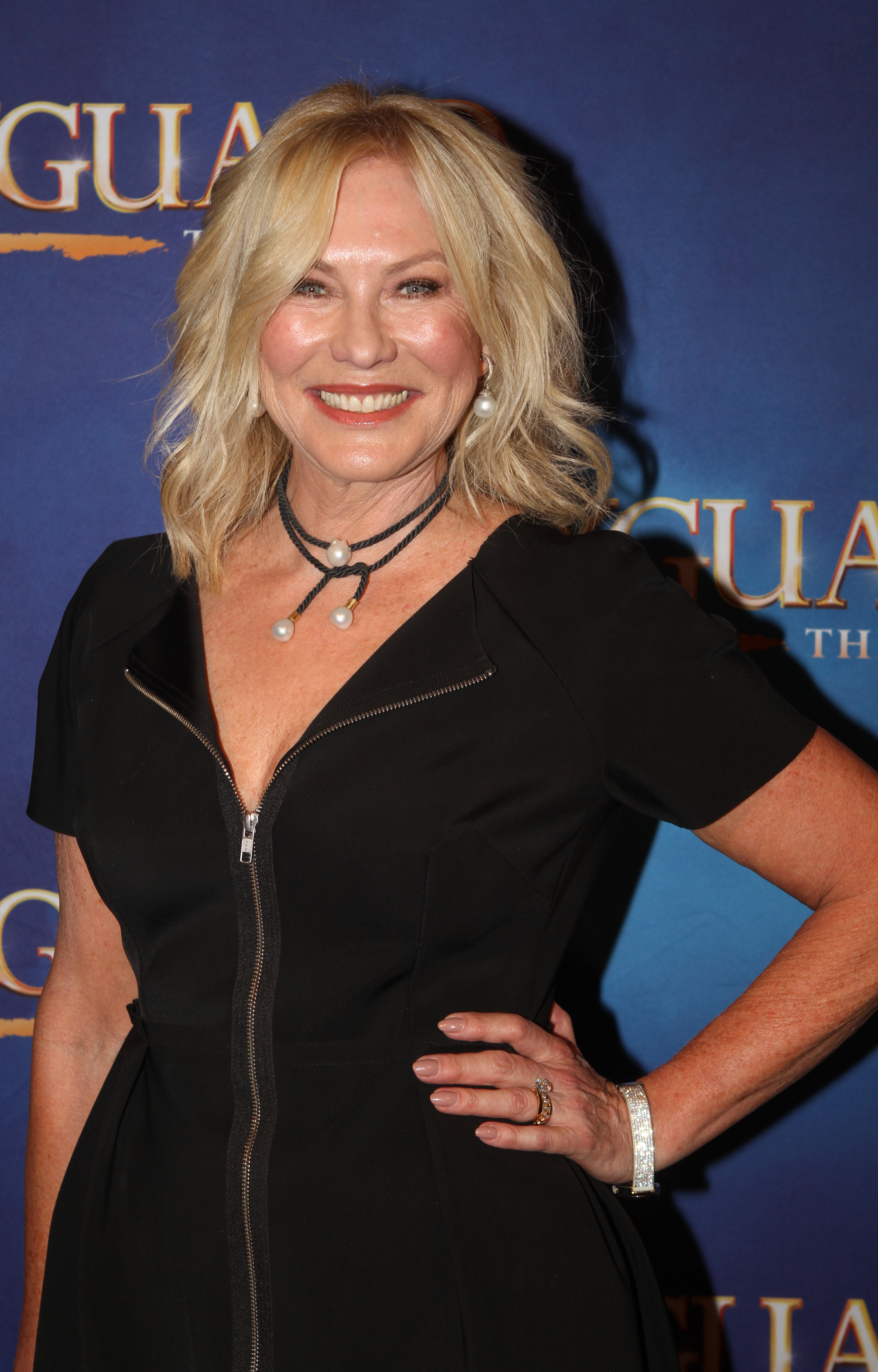 Kerri-Anne Kennerley lors de la première de The Bodyguard à Sydney